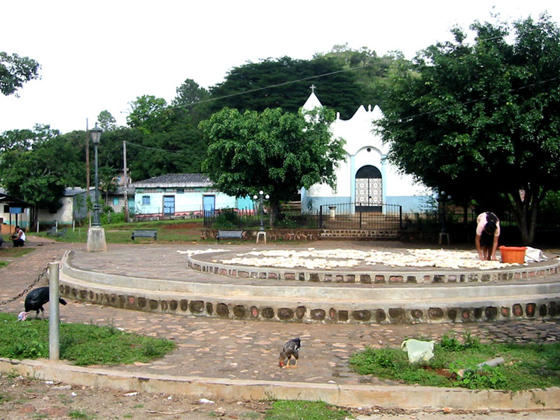 Town square in El Mozote, Morazan, El Salvador.